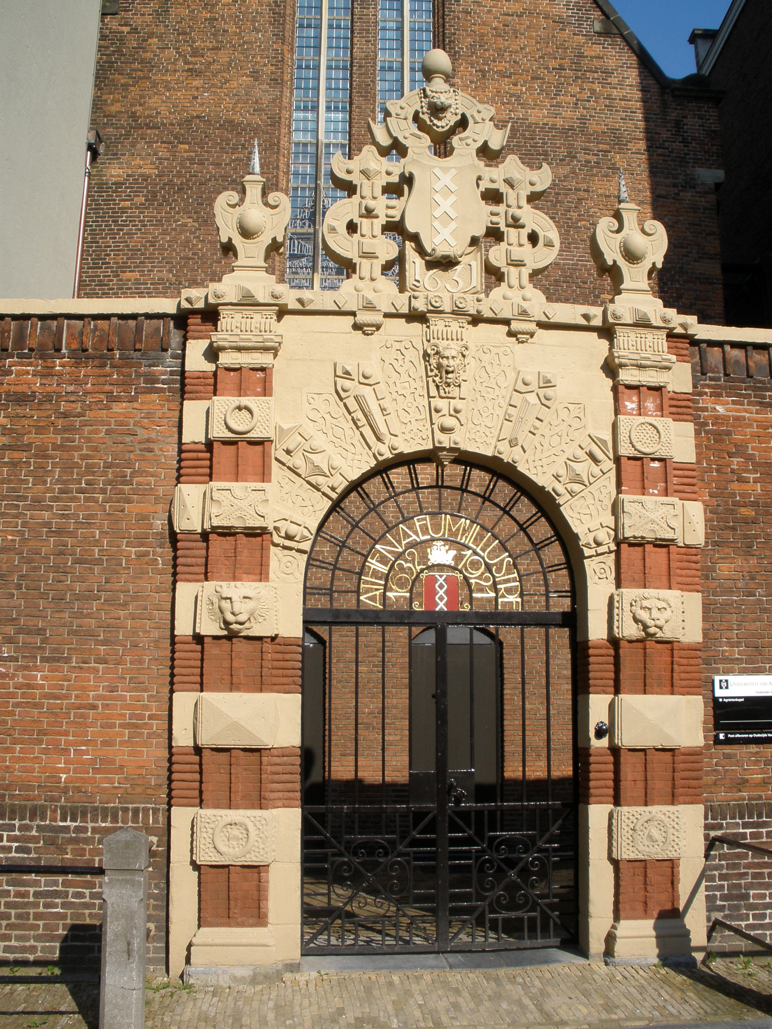 Gate of Agnietenkapel (St. Agnes Chapel) on Oudezijds Voorburgwal in Amsterdam.